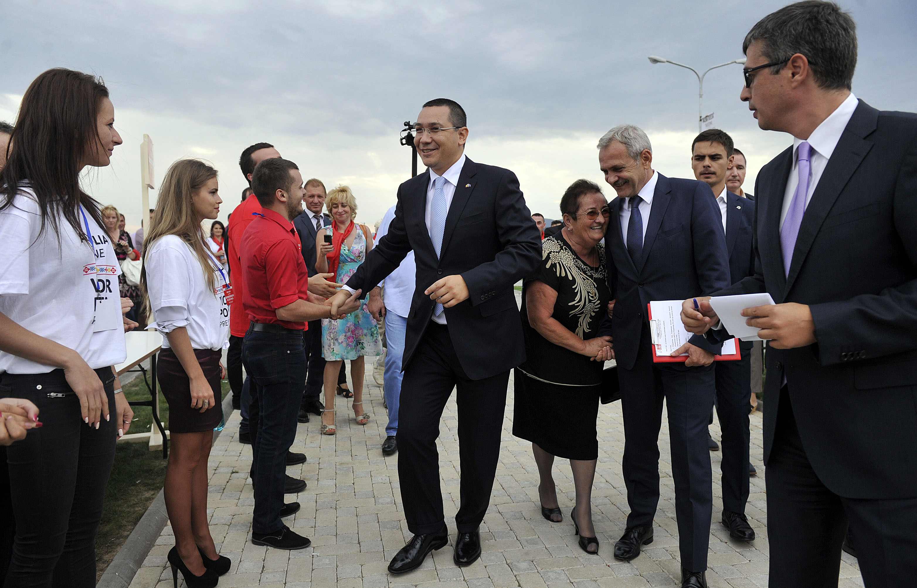 1. Congresul National al PSD, Alba Iulia - 12.09 (27)